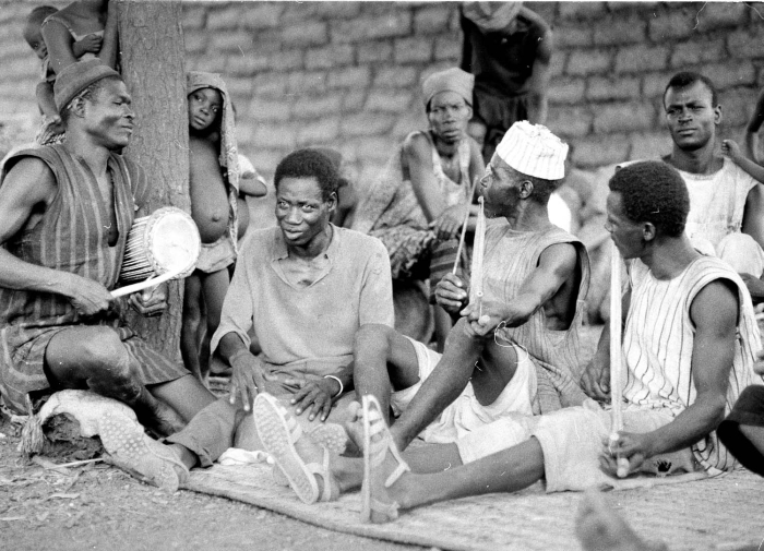 De opname is gemaakt tijdens één van de twee verzamelexpedities die het Tropenmuseum in 1970-1971 ondernam ter voorbereiding op de grote tentoonstelling in 1971-1972, getiteld 'Samo. Een Afrikaans Savannevolk in ontwikkeling'. De expedities duurden elk drie maanden en werden uitgevoerd door de heren J.T. Broekhuijse en F.M. Cowan. Een foto van dit gezelschap staat ook afgebeeld in de catalogus bij de hierboven genoemde tentoonstelling met het bijschrift 'Het dorpsorkest treedt op bij bijzondere gelegenheden' (1971: 13).